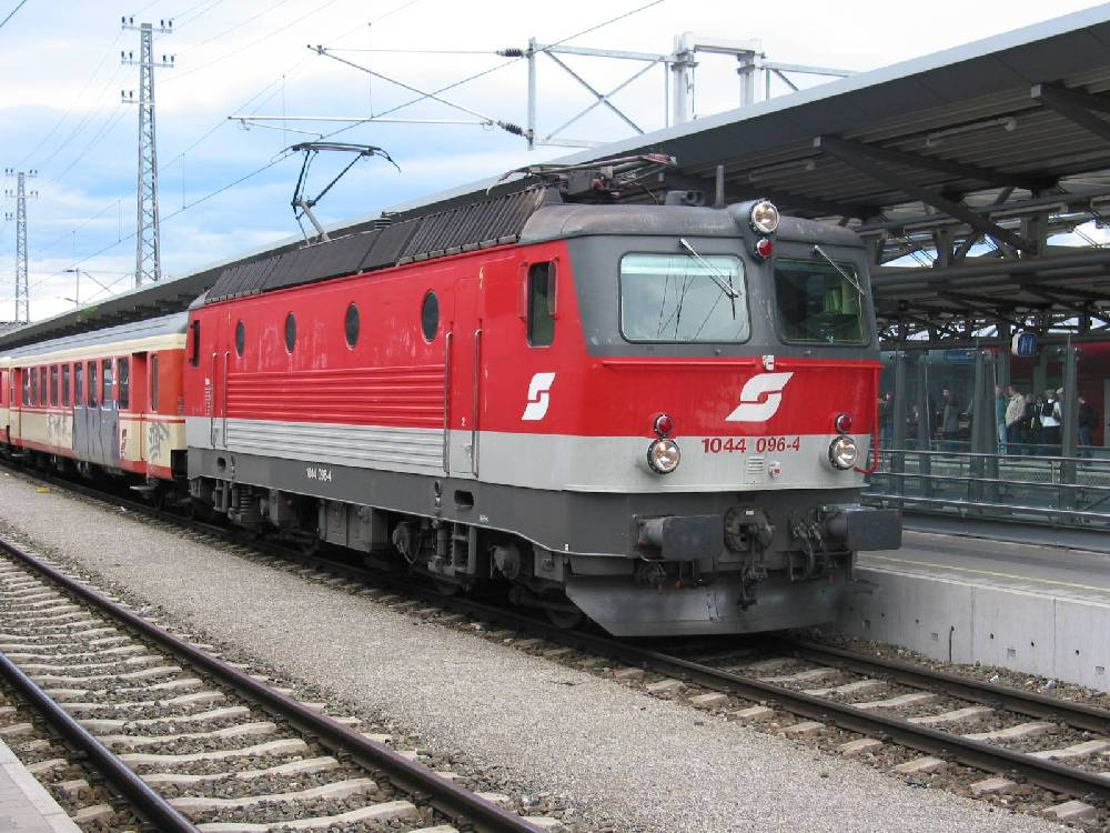 1044 096-4 in Wiener Neustadt Hbf